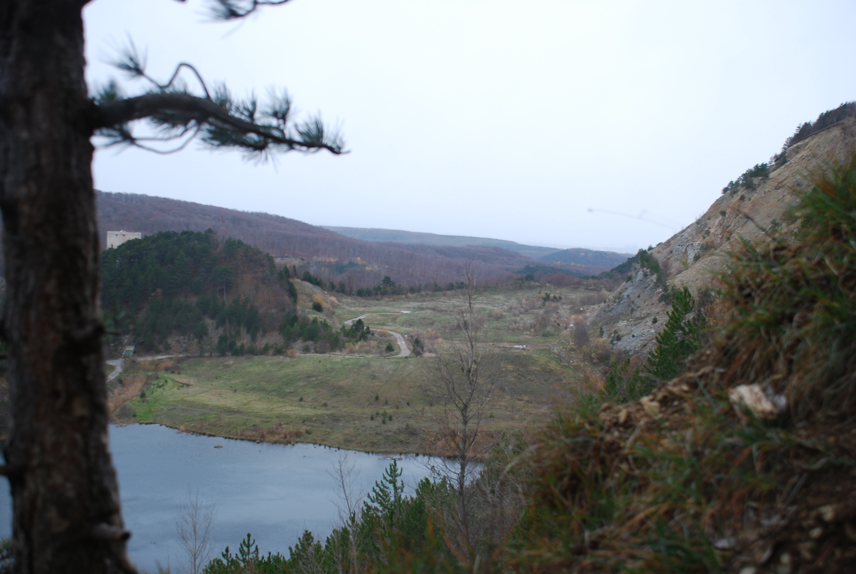 Gebiet des alten Steinbruchs am Teufelstein